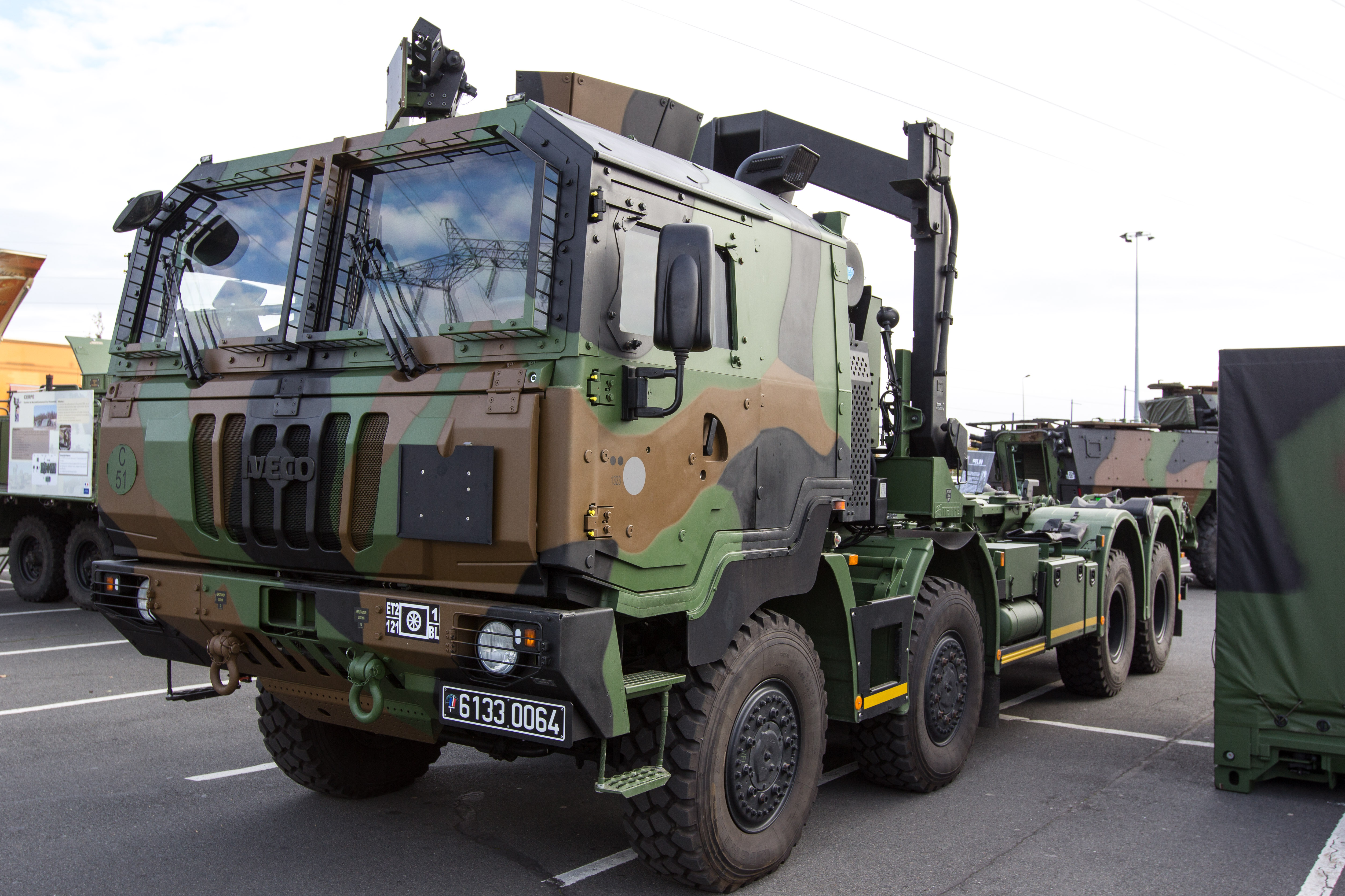 Un camion Porteur Polyvalent Terrestre PPLOG DP /Matériel du 121e régiment du train de la 1ere brigade logistique présenté lors de l'exposition "Les forces armées s'invitent à villabé", du 23 au 25 octobre 2014 au Centre commercial Villabé A6 / Villabé / Essonne / France